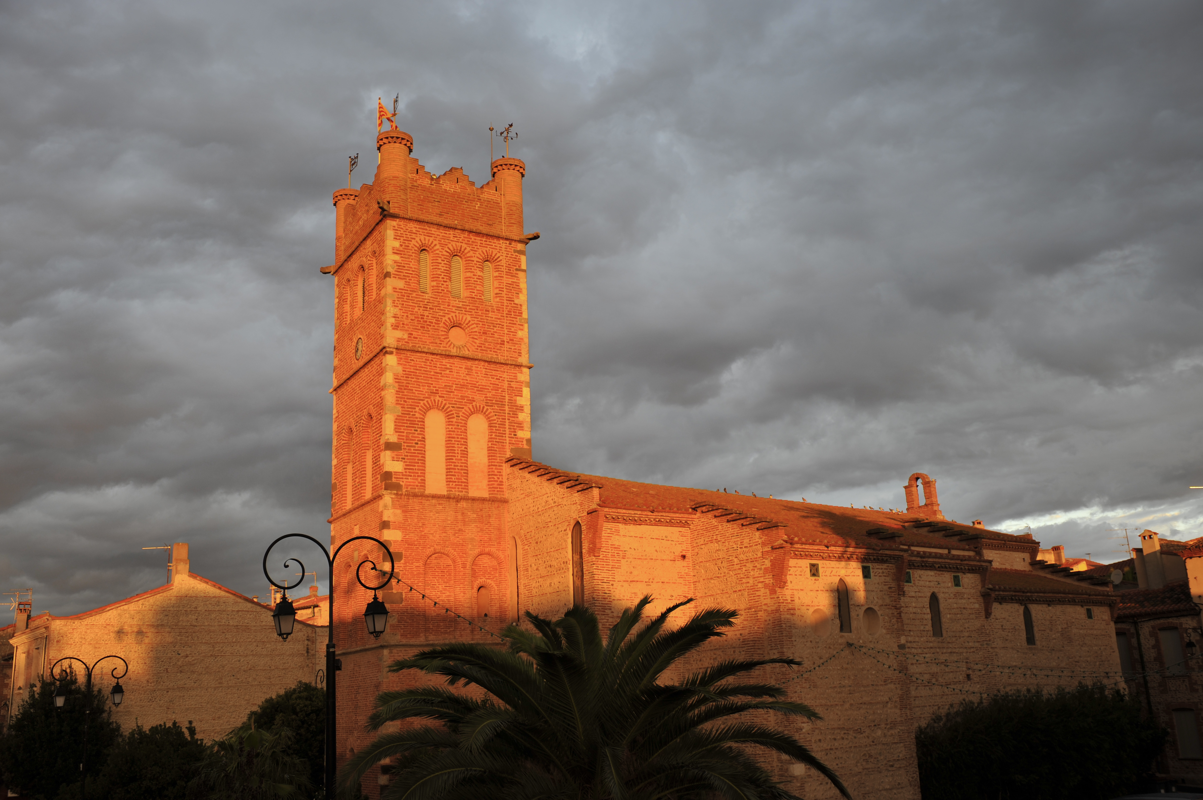 L'église Saint-Jacques de Canet-en-Roussillon